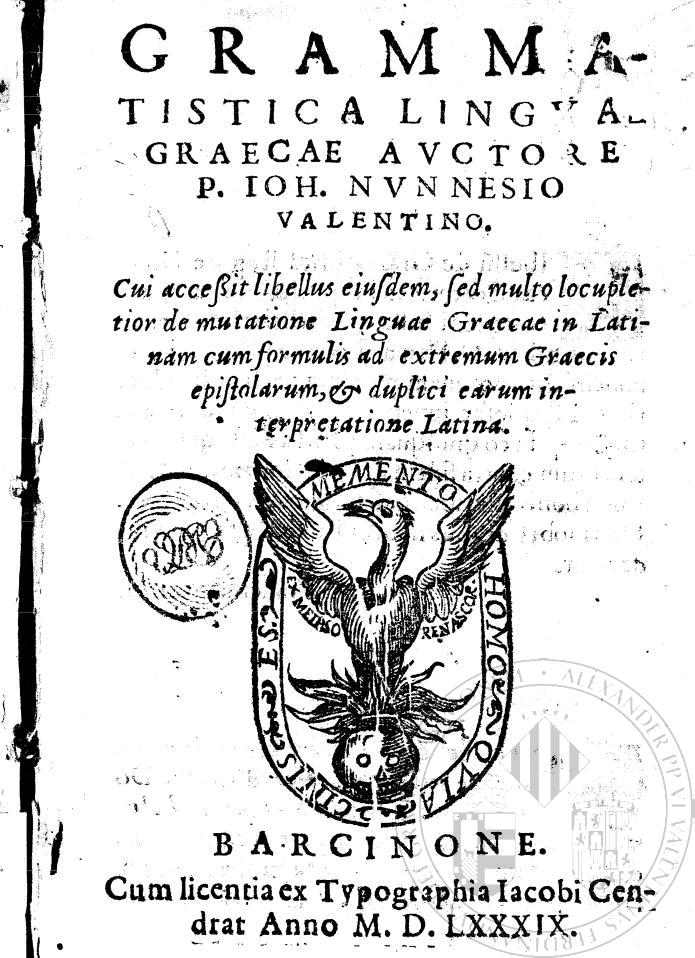 Portada de l'obra "Grammatistica lingvae graecae" de Pere Joan Nunyes. Barcinone : Ex typographia Iacobi Cendrat, 1589.